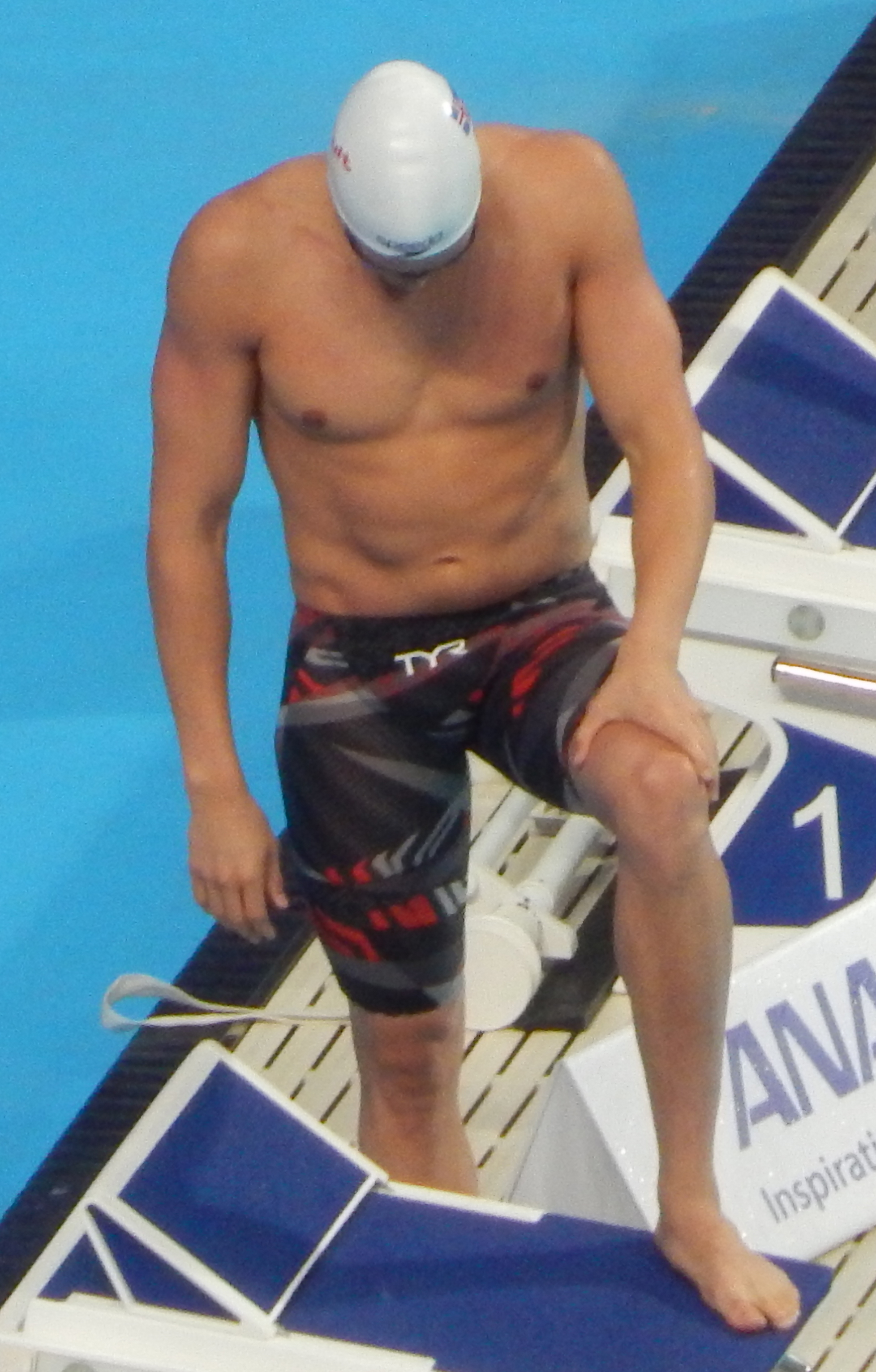 Антон Свин Макки на чемпионате мира в Казани